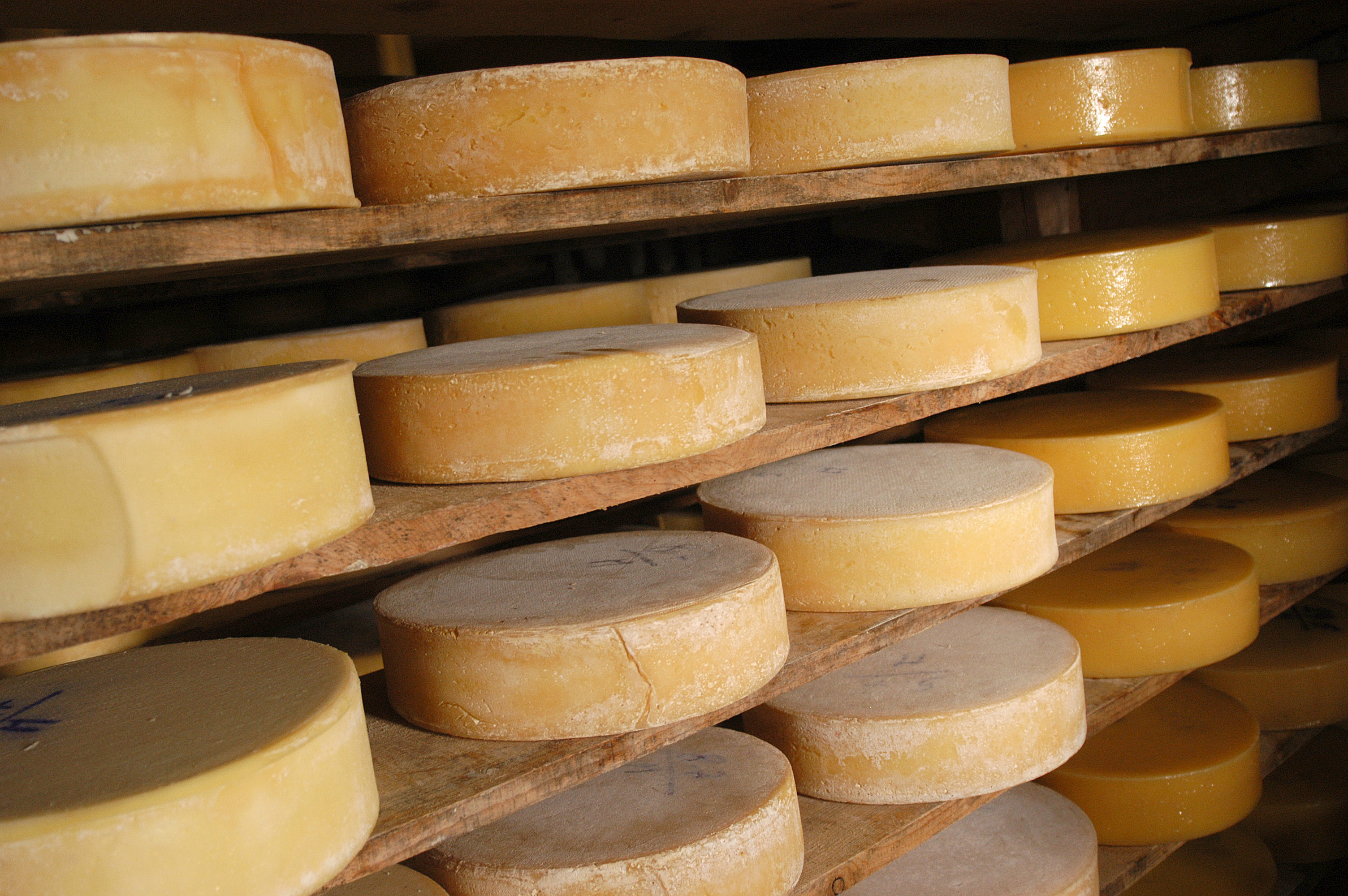 Produzione e stragionatura